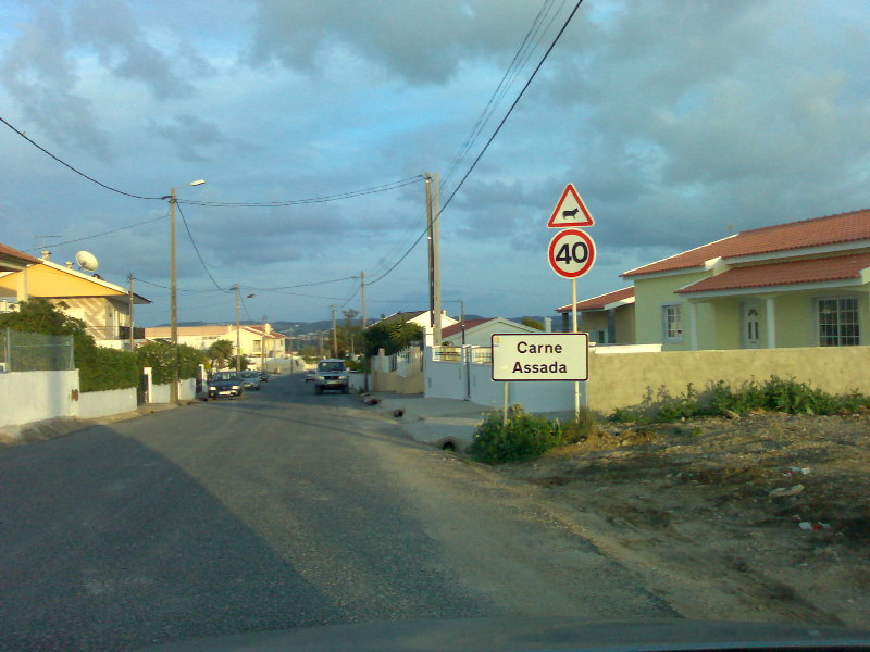 Carne Assada, uma localidade do concelho de Sintra, em Portugal. Carne Assada, a small town in the municipality of Sintra, in Portugal.